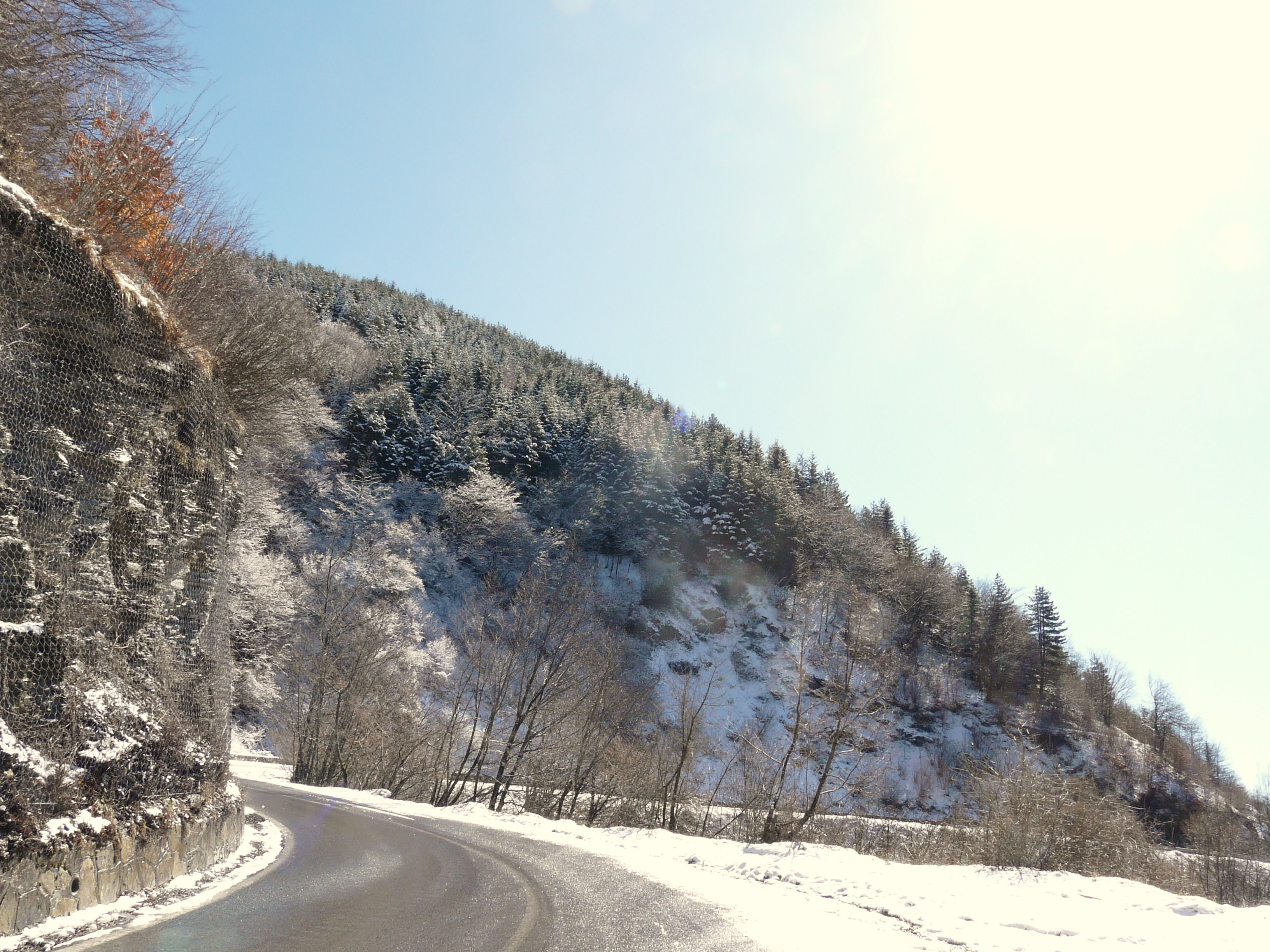 Fascia, Liguria, Italia